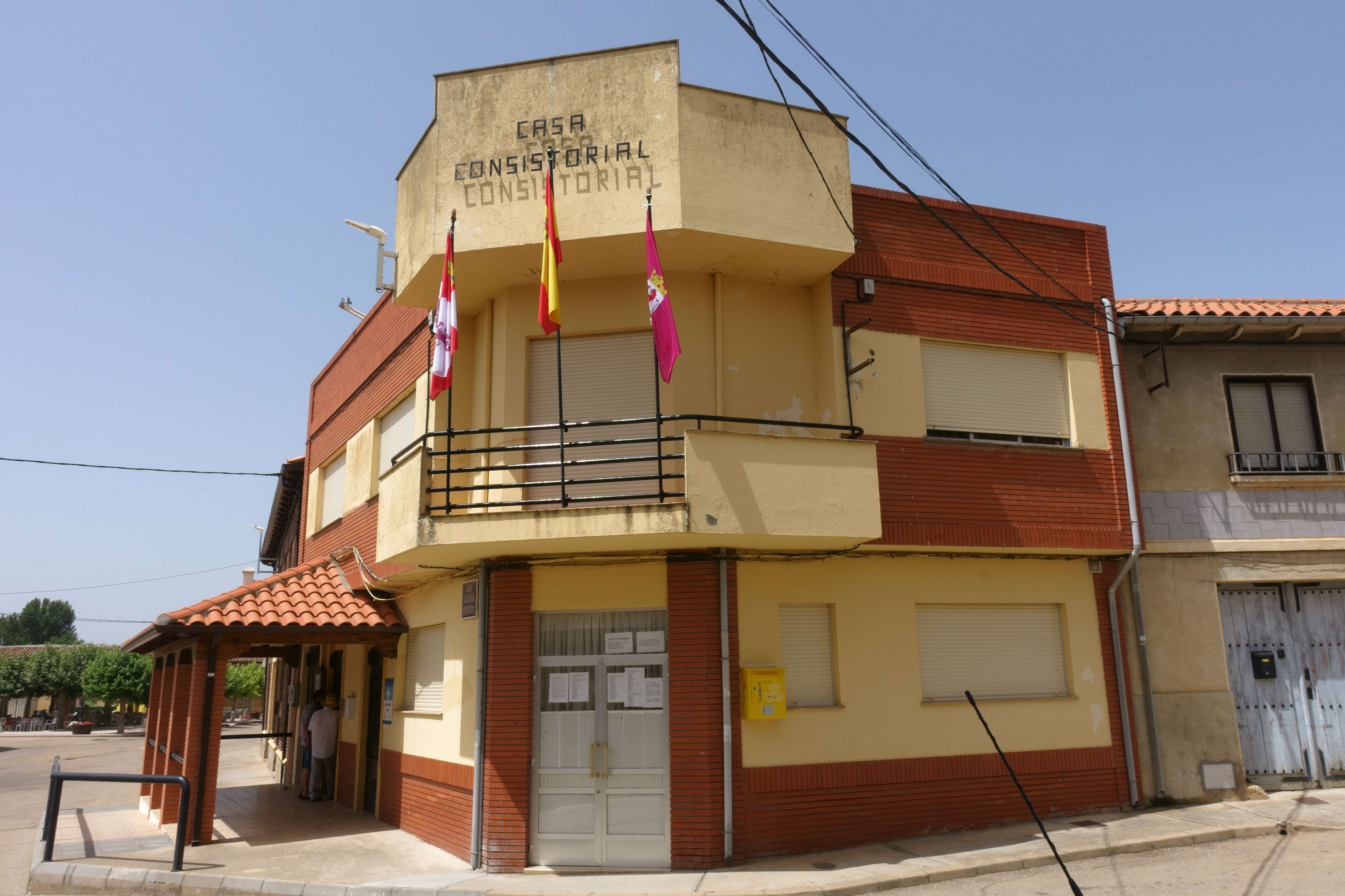 Casa consistorial de San Adrián del Valle (León, España).